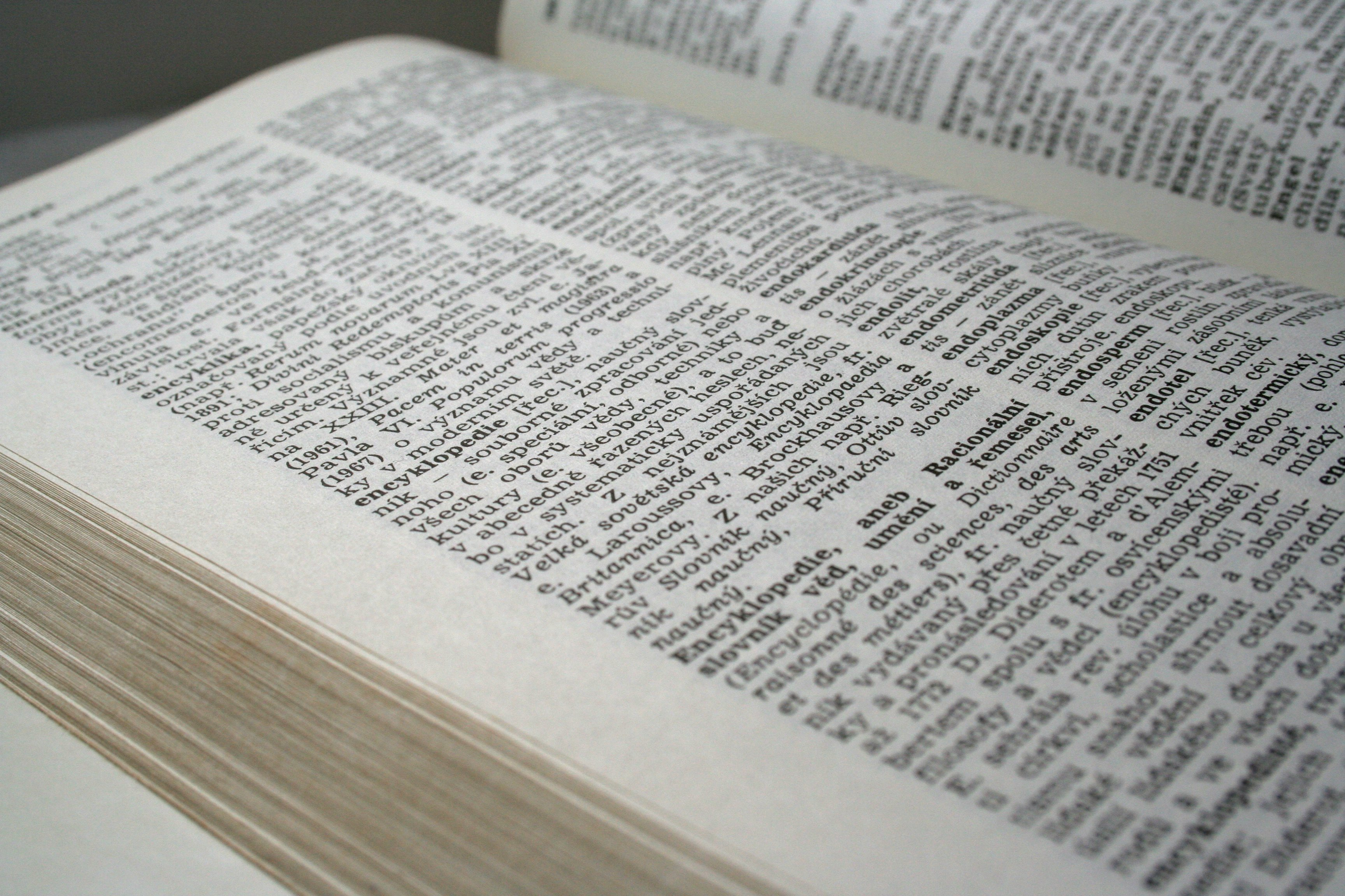 Otevřený Malý encyklopedický slovník A-Ž (Academia, 1972)